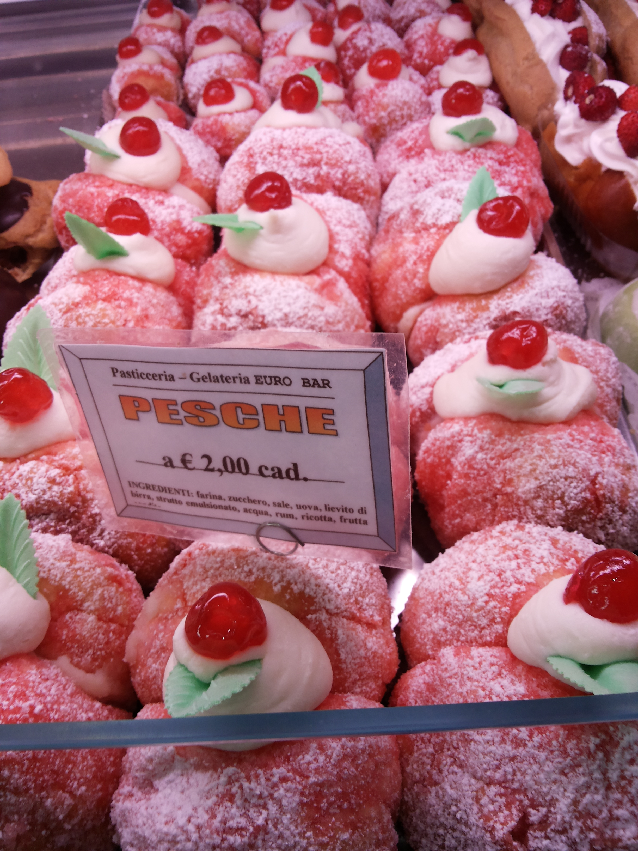 "Pesche" - specialità della pasticceria di Dattilo